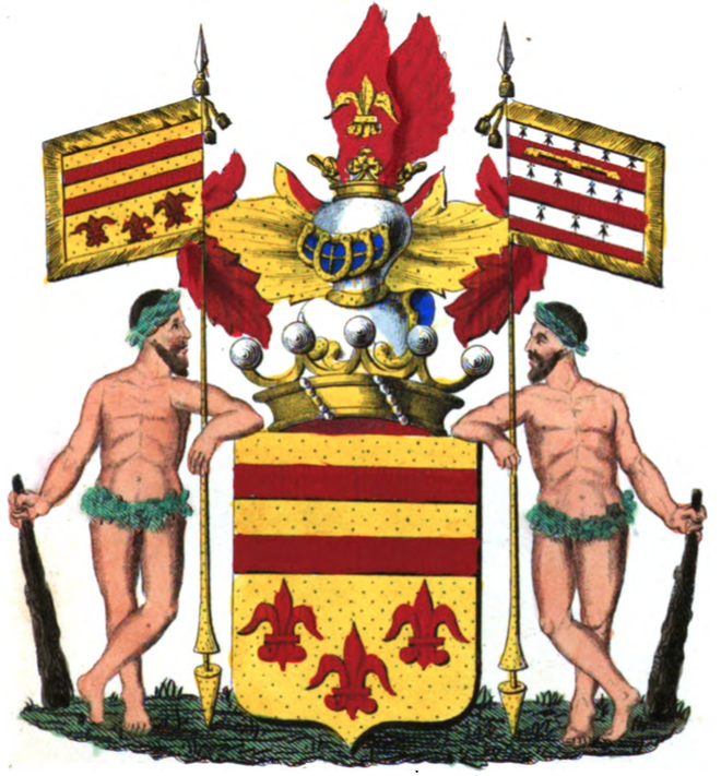 Armoiries de la famille Hynderick